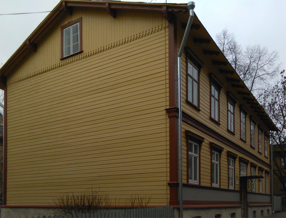 Rõhtlaudis on üheks Lenderi maja iseloomustavaks jooneks. Allika 4, Tallinn